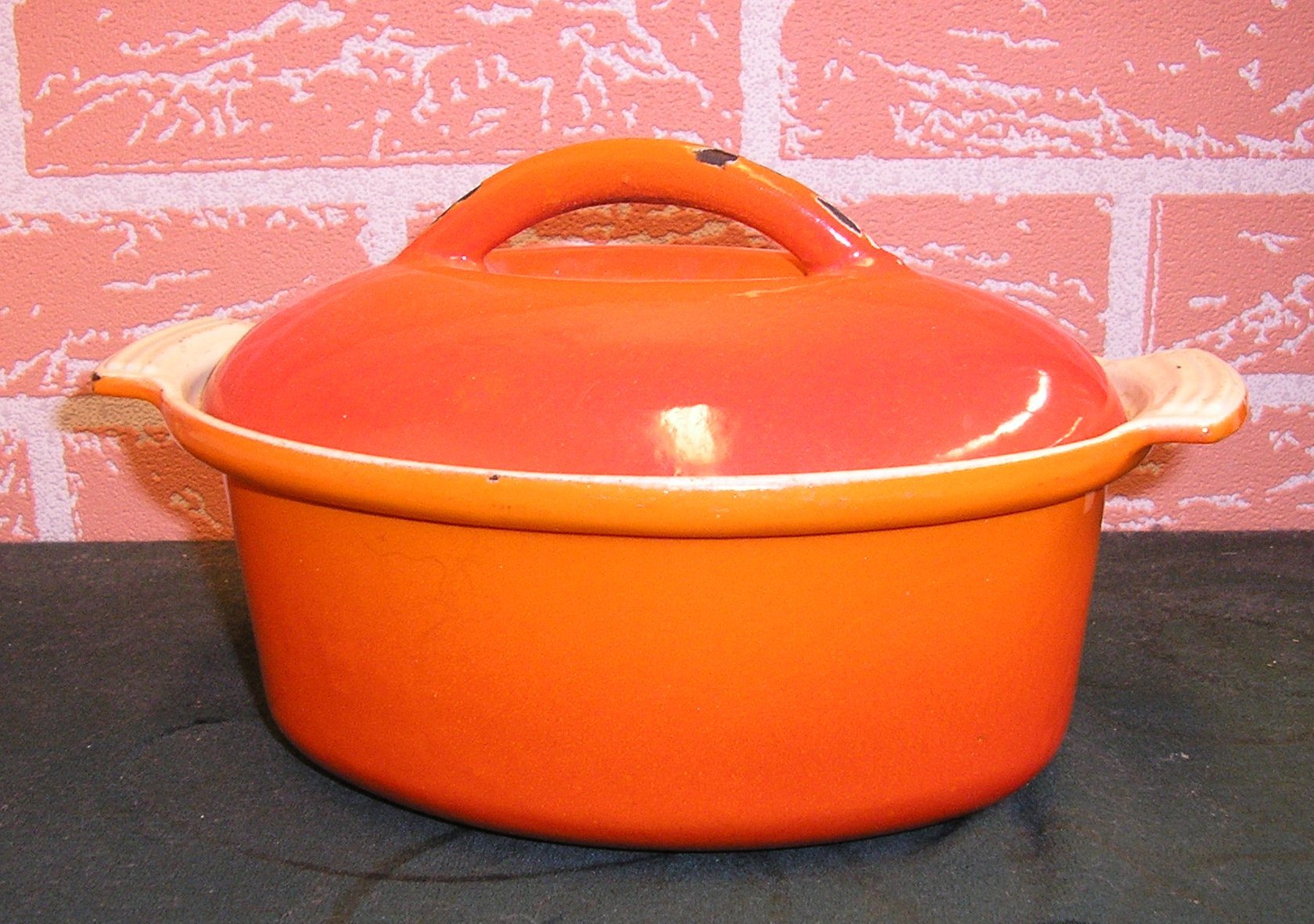 Bolinder's enameled cooking pot